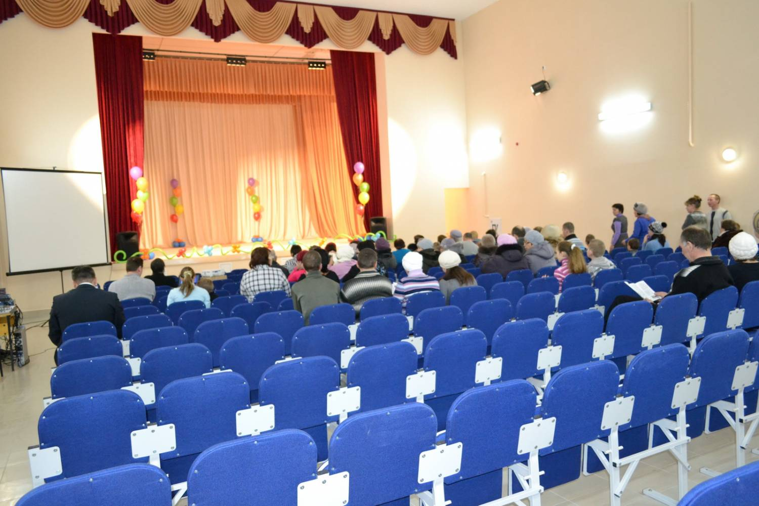 Обновленный Дом культуры в селе Филиппово